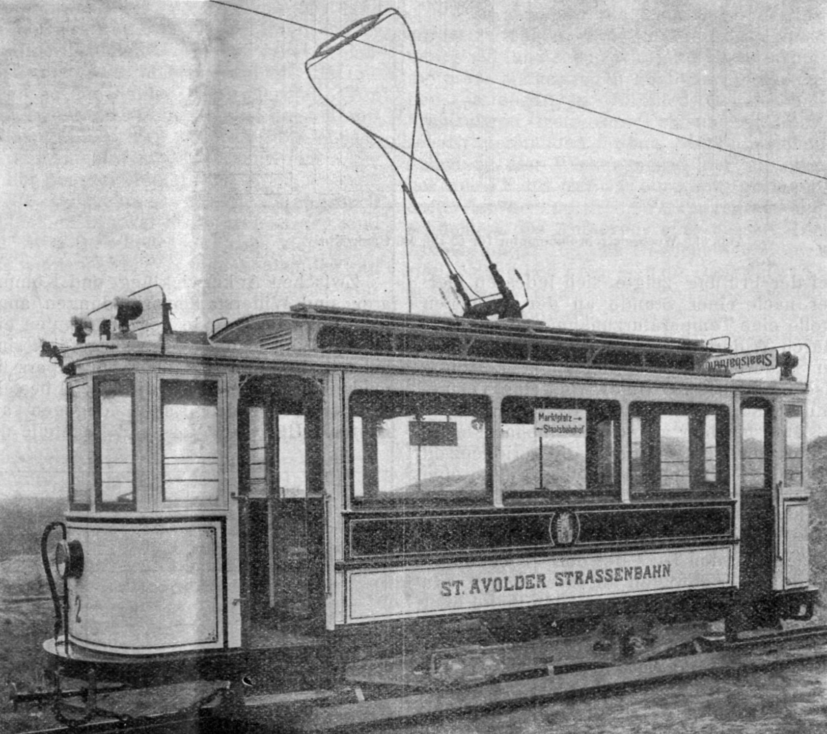 Wagen Nr. 2 der St. Avolder Straßenbahn